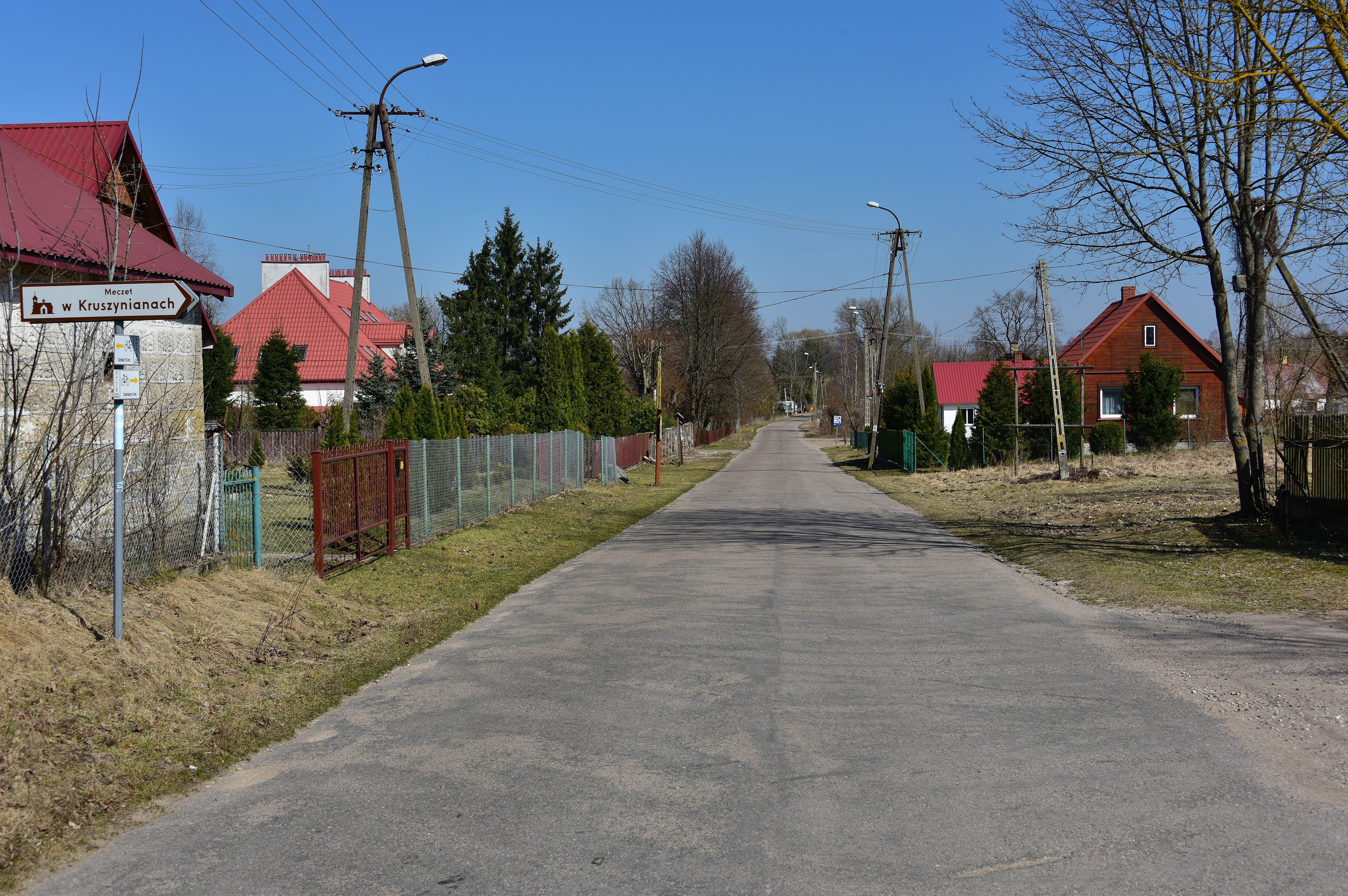 Wieś Kruszyniany, gmina Krynki, województwo podlaskie